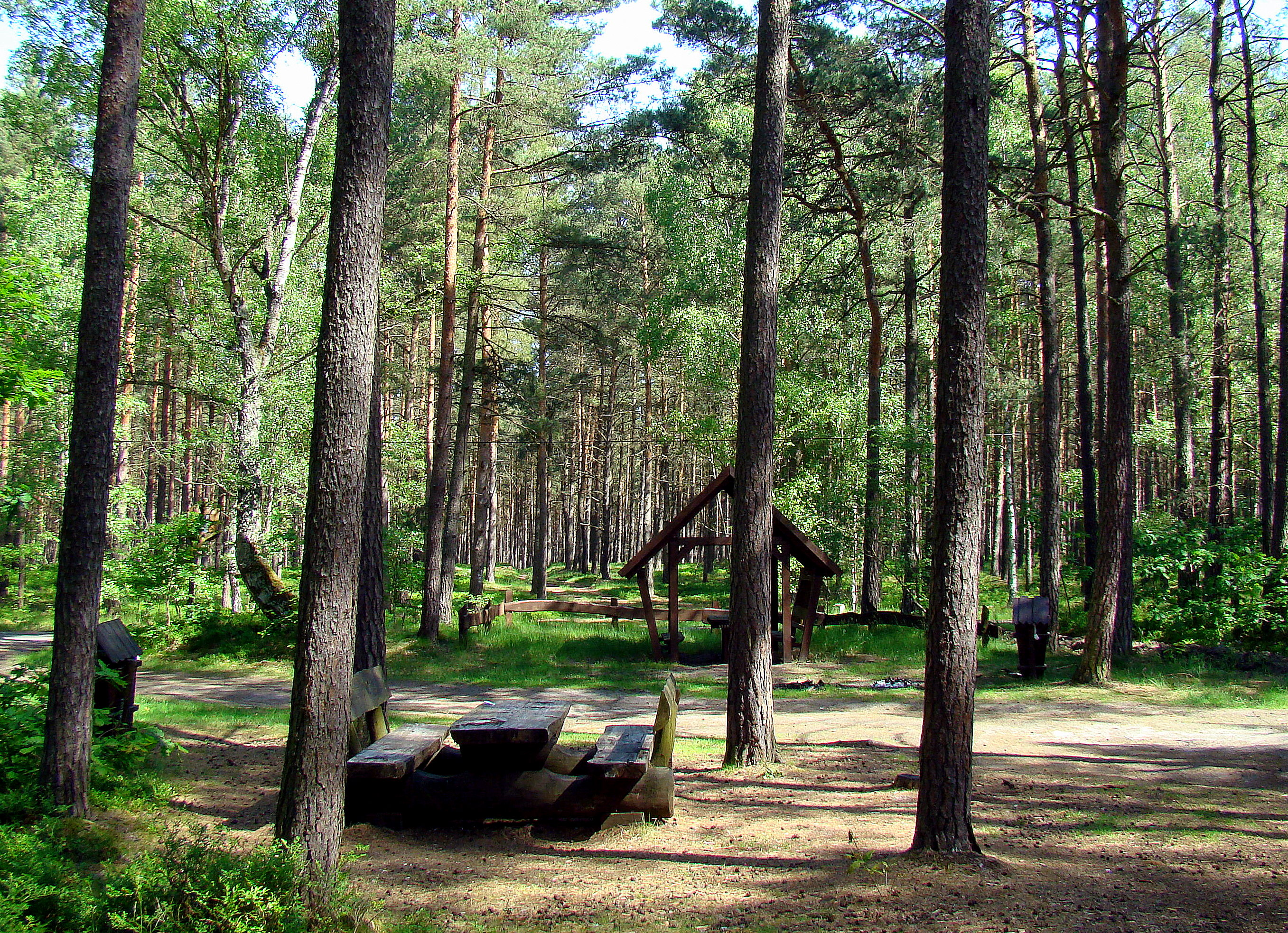 Puszcza Wkrzańska, altanka turystyczna, (Powiat policki, Województwo zachodniopomorskie), Polska